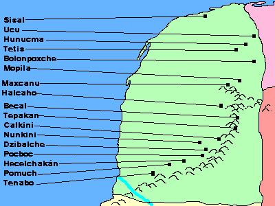 Cacicazgo de Ah Canul durante la conquista de Yucatán, en el siglo XVI trabajo realizado en paint